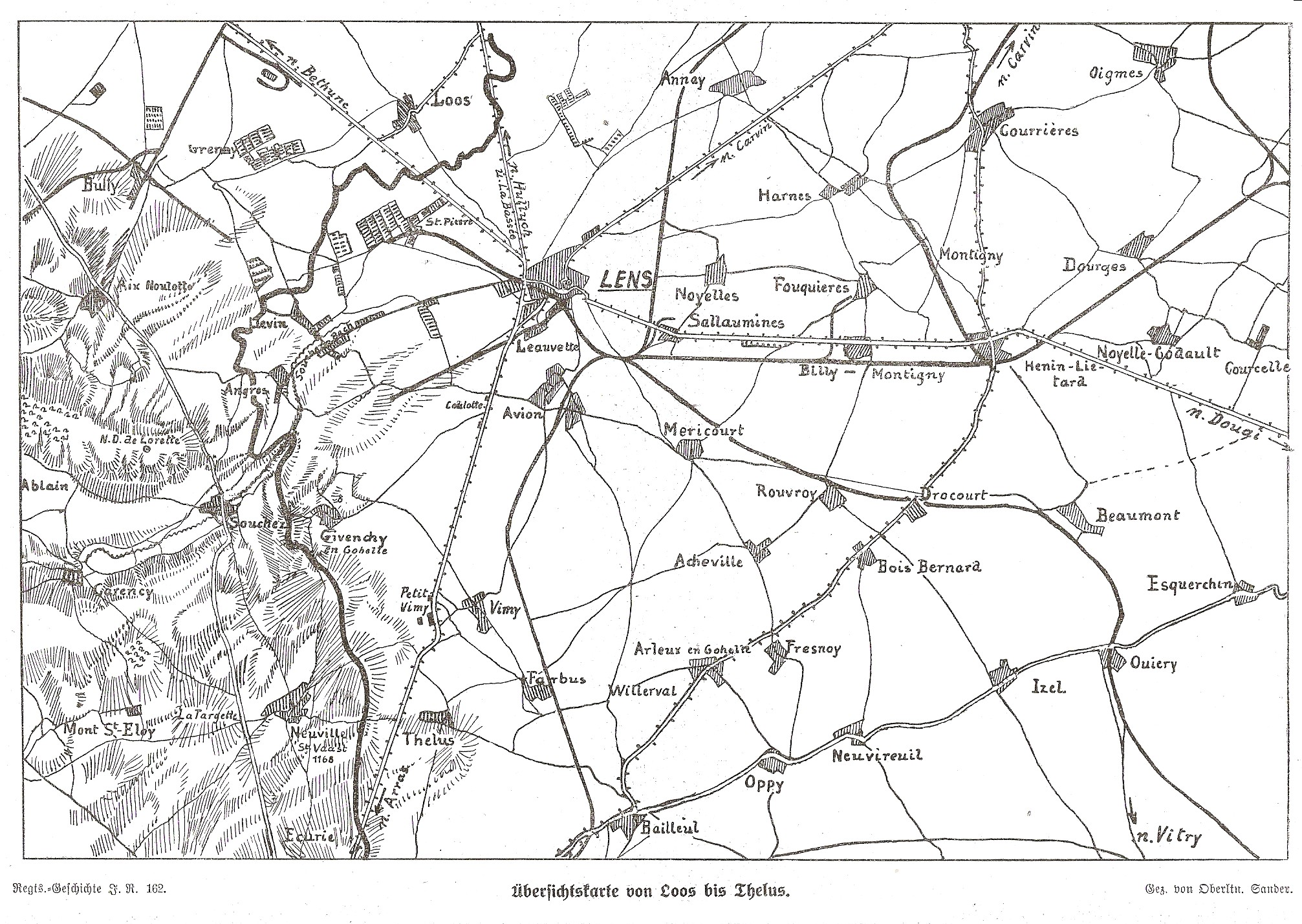 Übersichtskarte von Loos bis Thélus